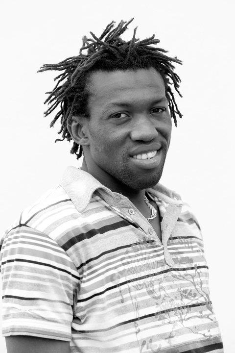 Gambijski nogometni reprezentant Ousman Koli.